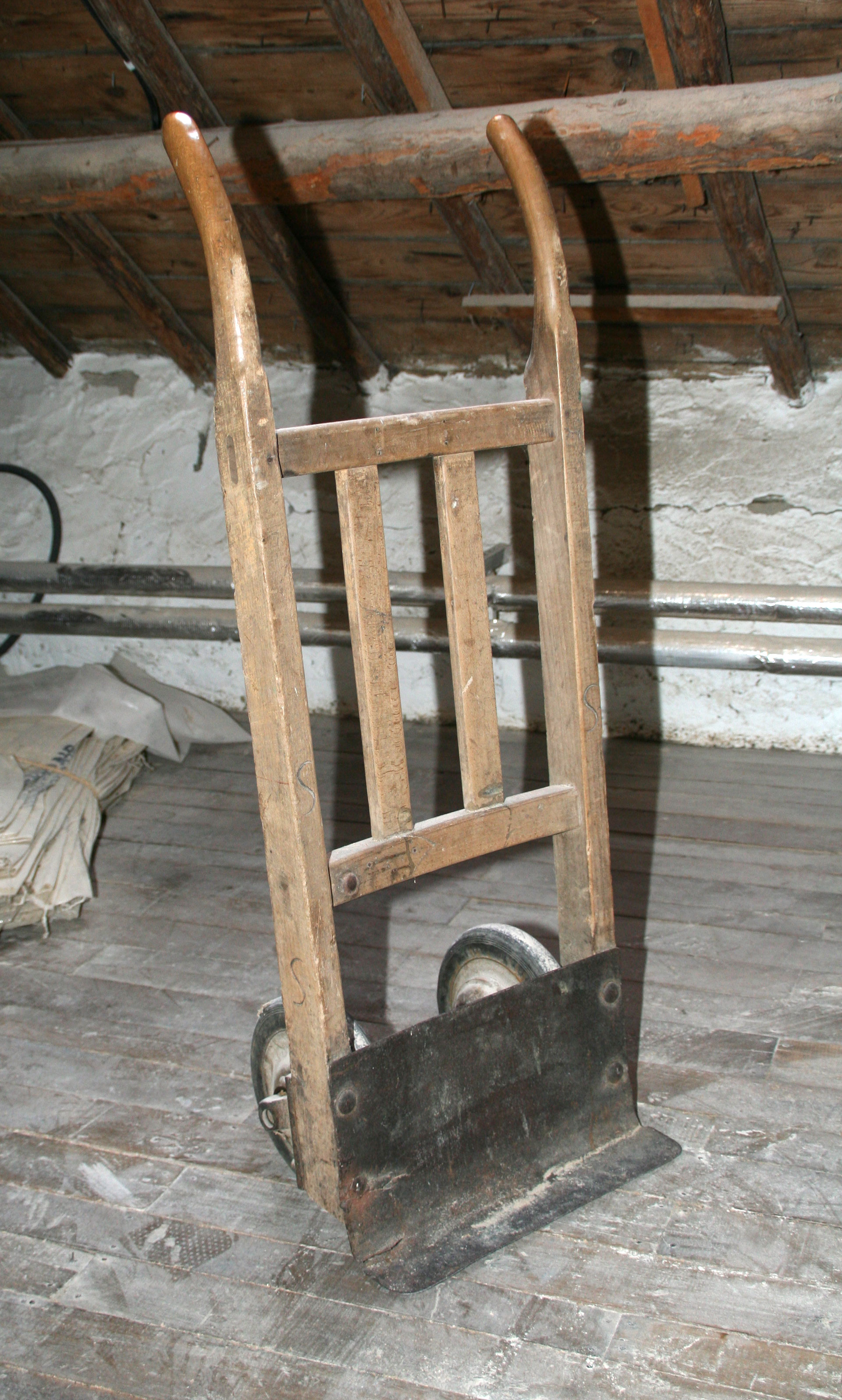 SK.